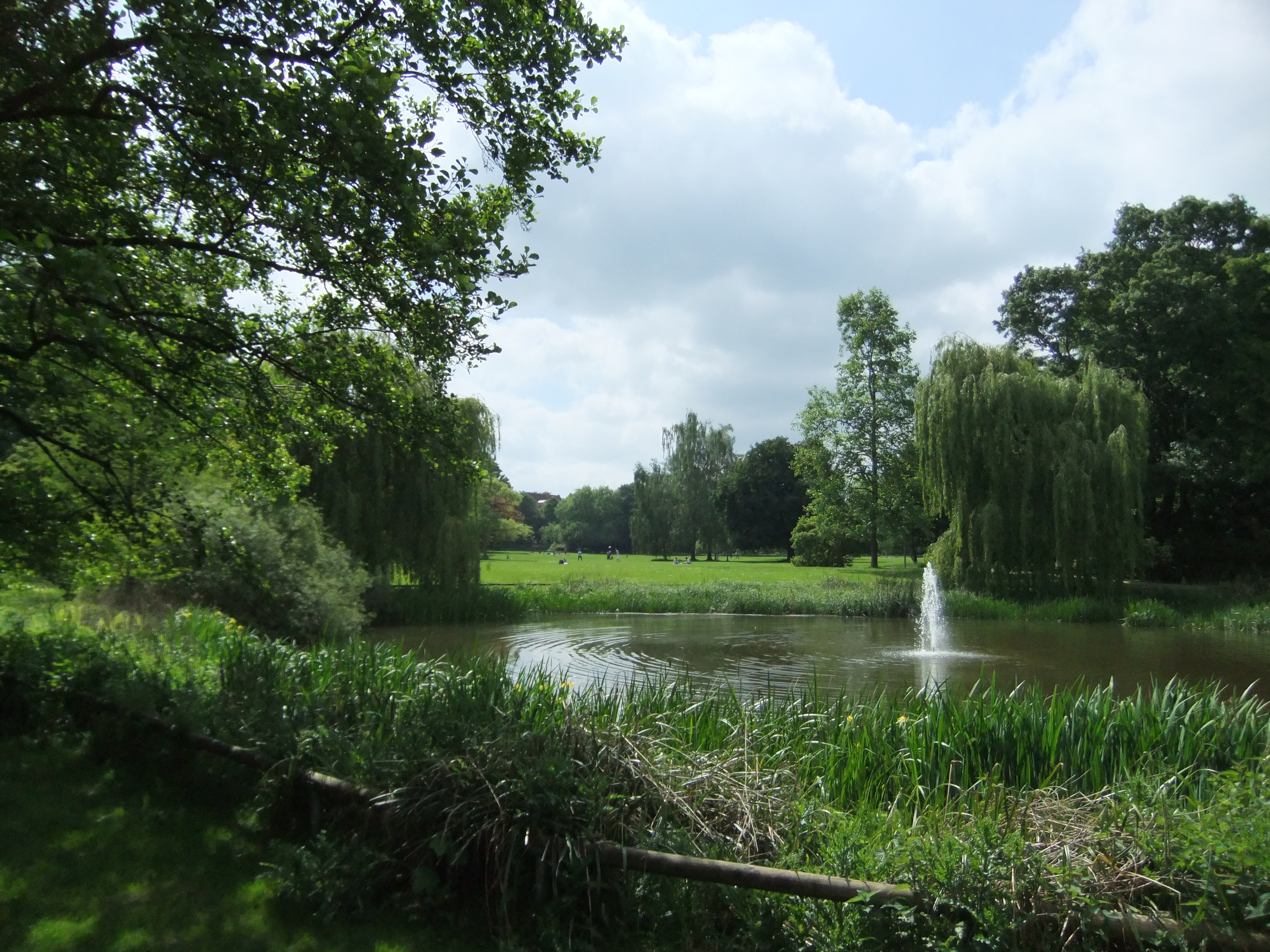 Teil des Nordparks in Bielefeld.